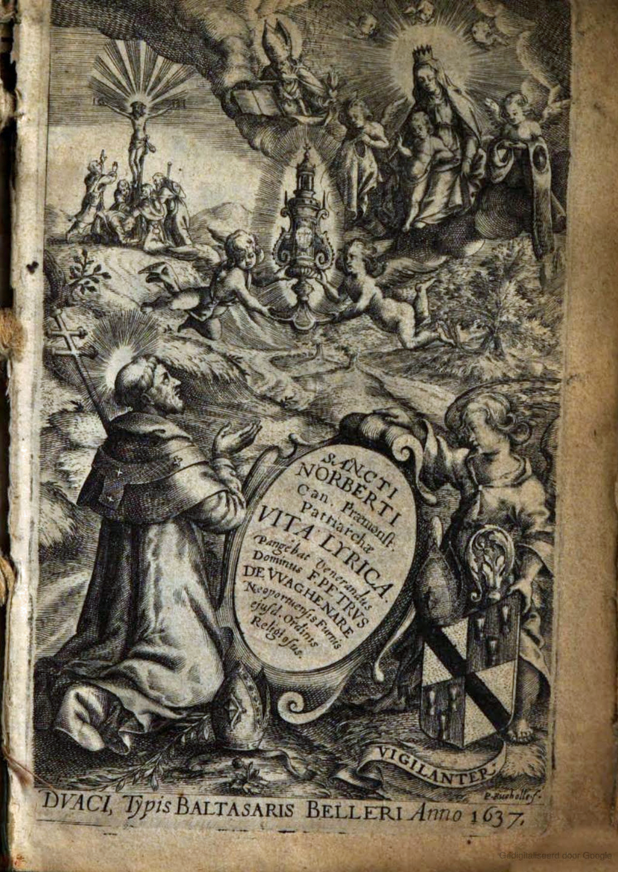 Sancti Norberti Canonicorvm Præmonstratensivm patriarchæ vita lyrica